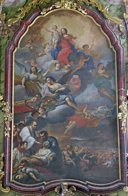 Obraz Maryi przedstawionej jako Ucieczka Grzeszników, znajdujący się w kościele pw. Wniebowzięcia NMP w Lubawce